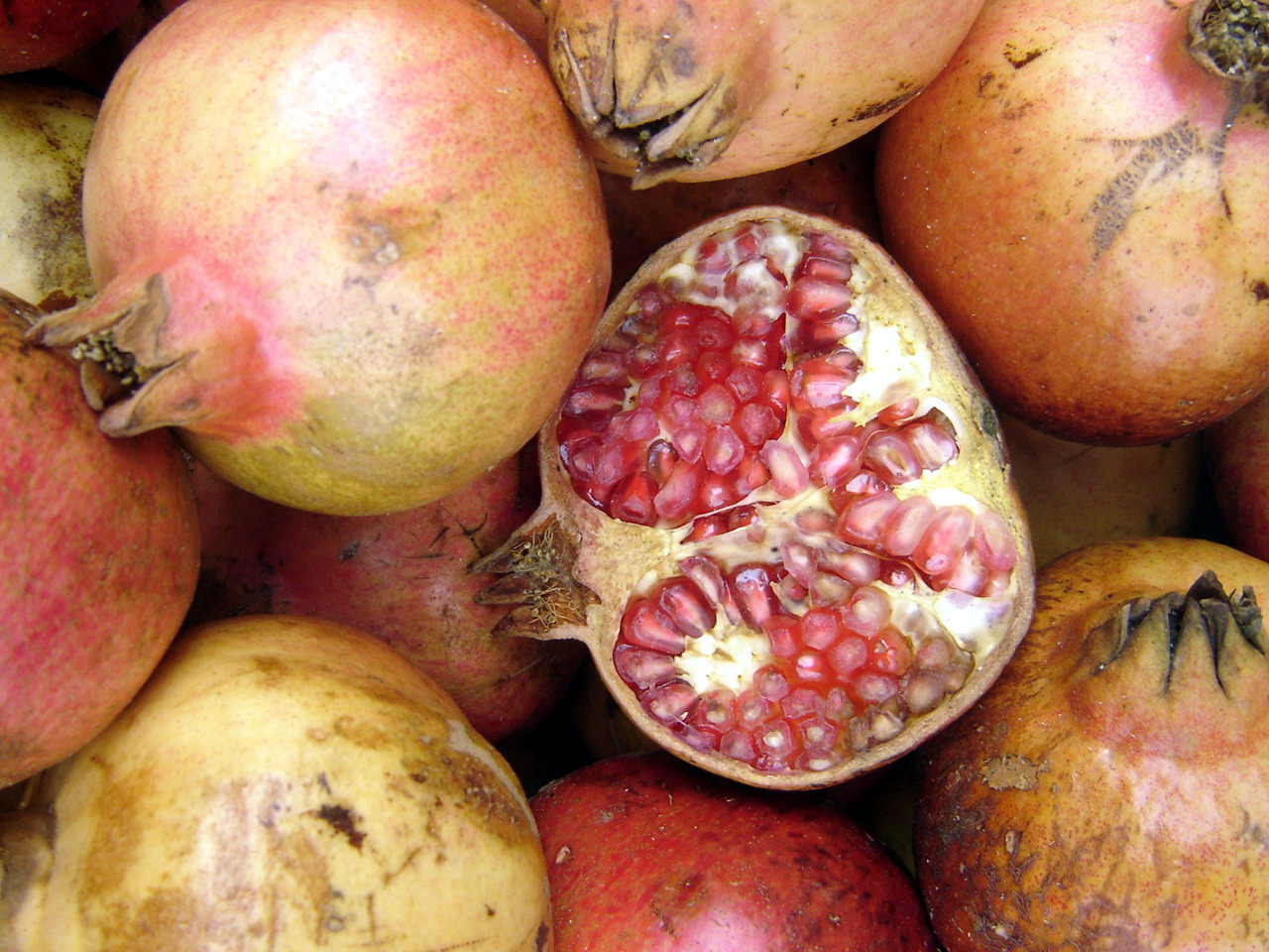 Photo taken in Buenos Aires, Argentina